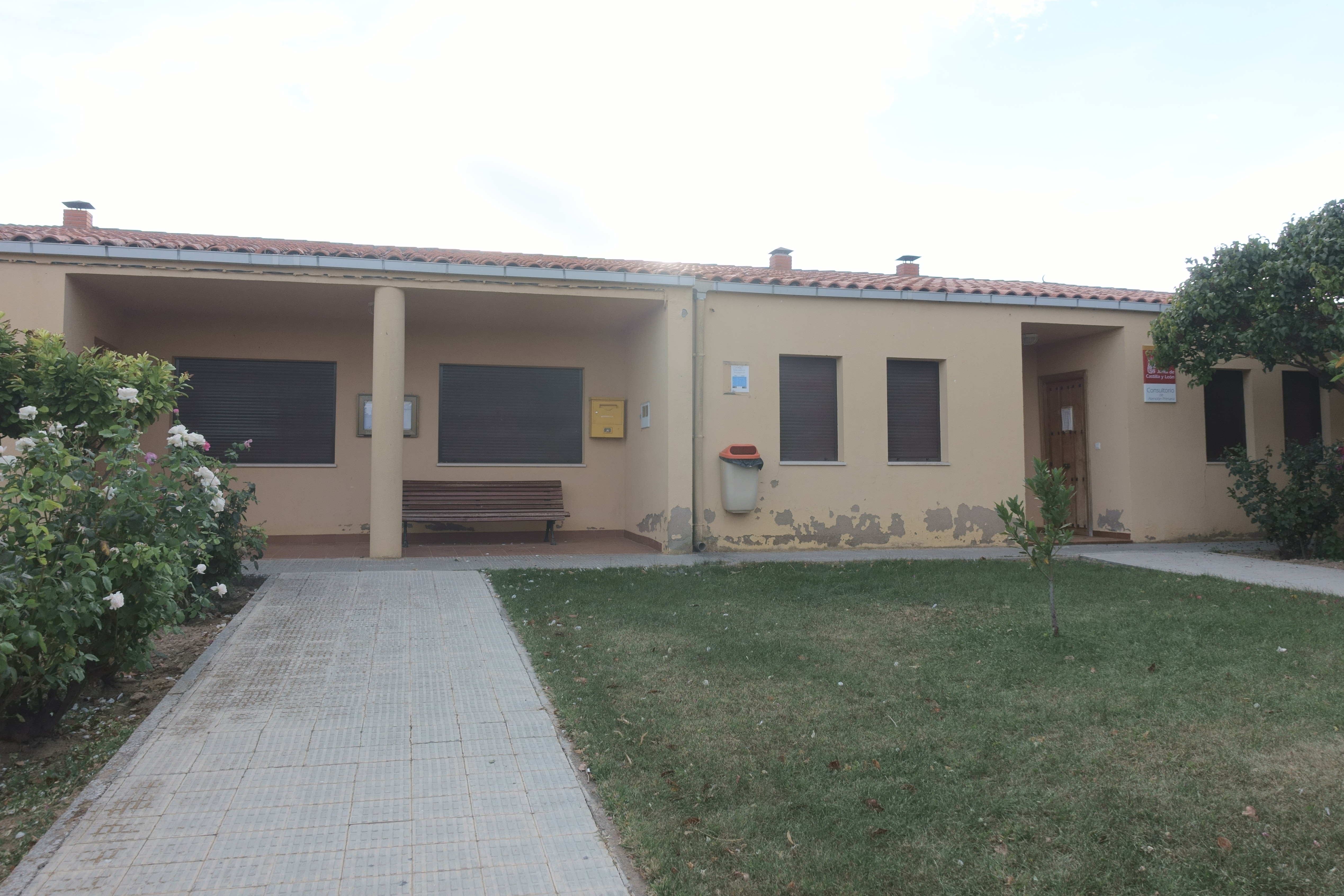 Casa consistorial de Pobladura de Valderaduey (Zamora, España).